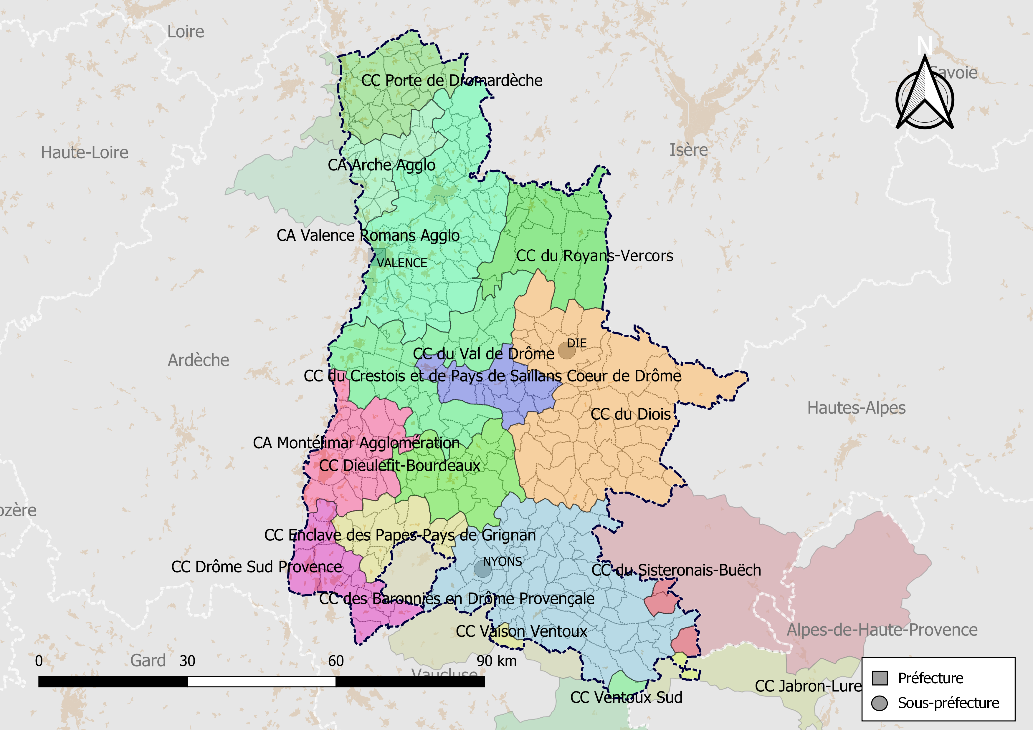 Carte des intercommunalités du département de la Drôme, France. Composition au 1er janvier 2019.